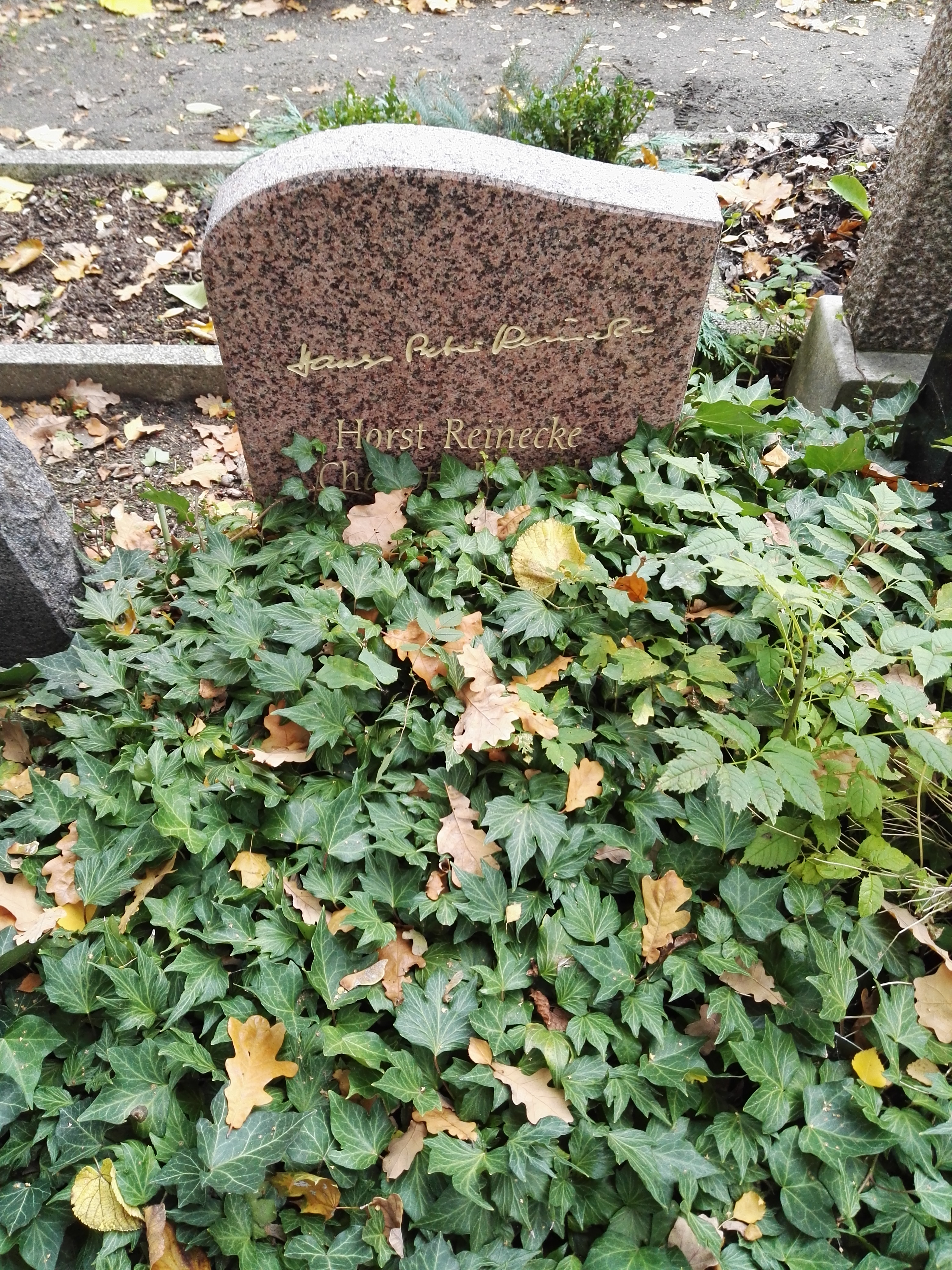 Grab von Hans-Peter Reinecke auf dem Friedhof der Dorotheenstädtischen und Friedrichswerderschen Gemeinden in Berlin